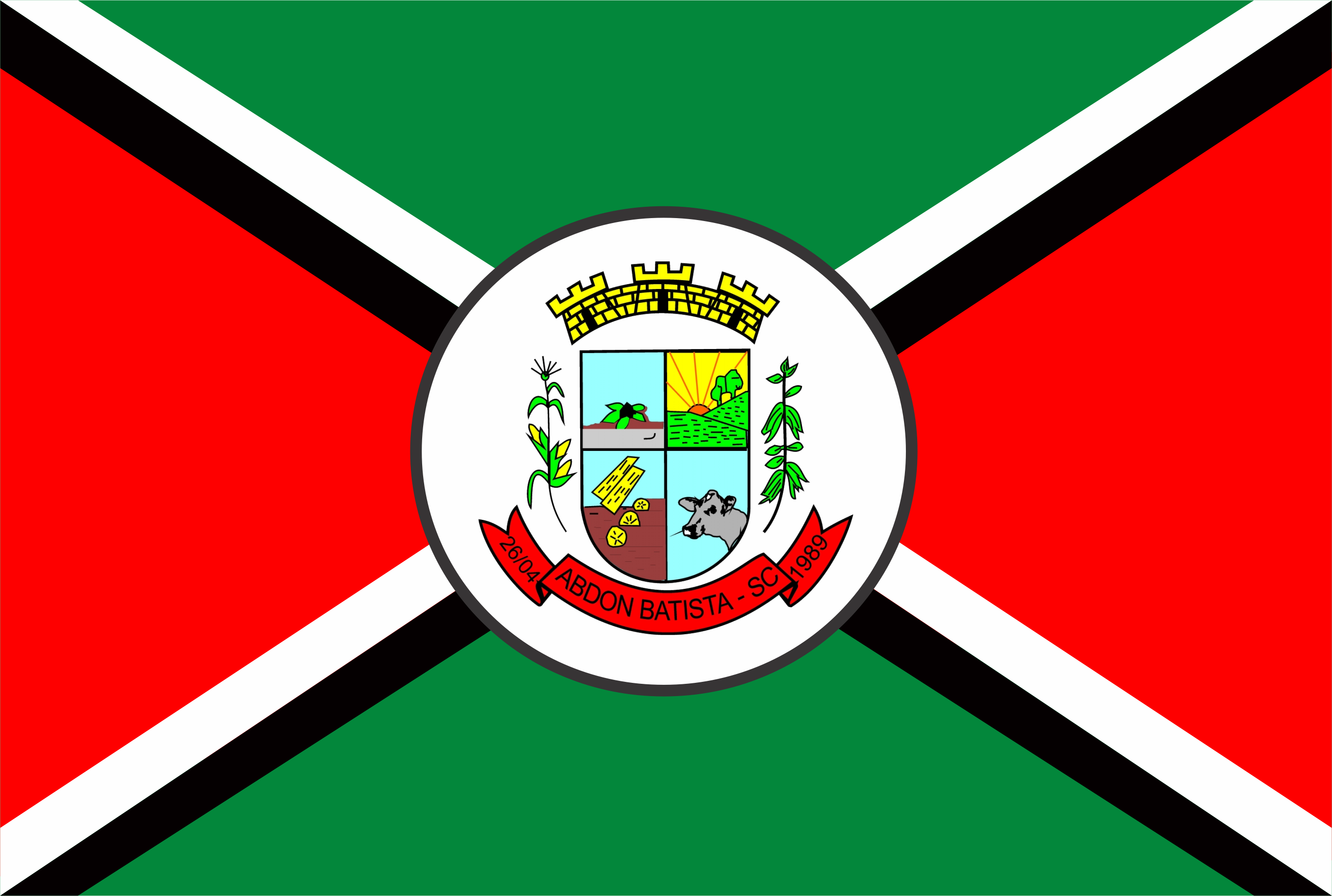 Bandeira de Abdon Batista